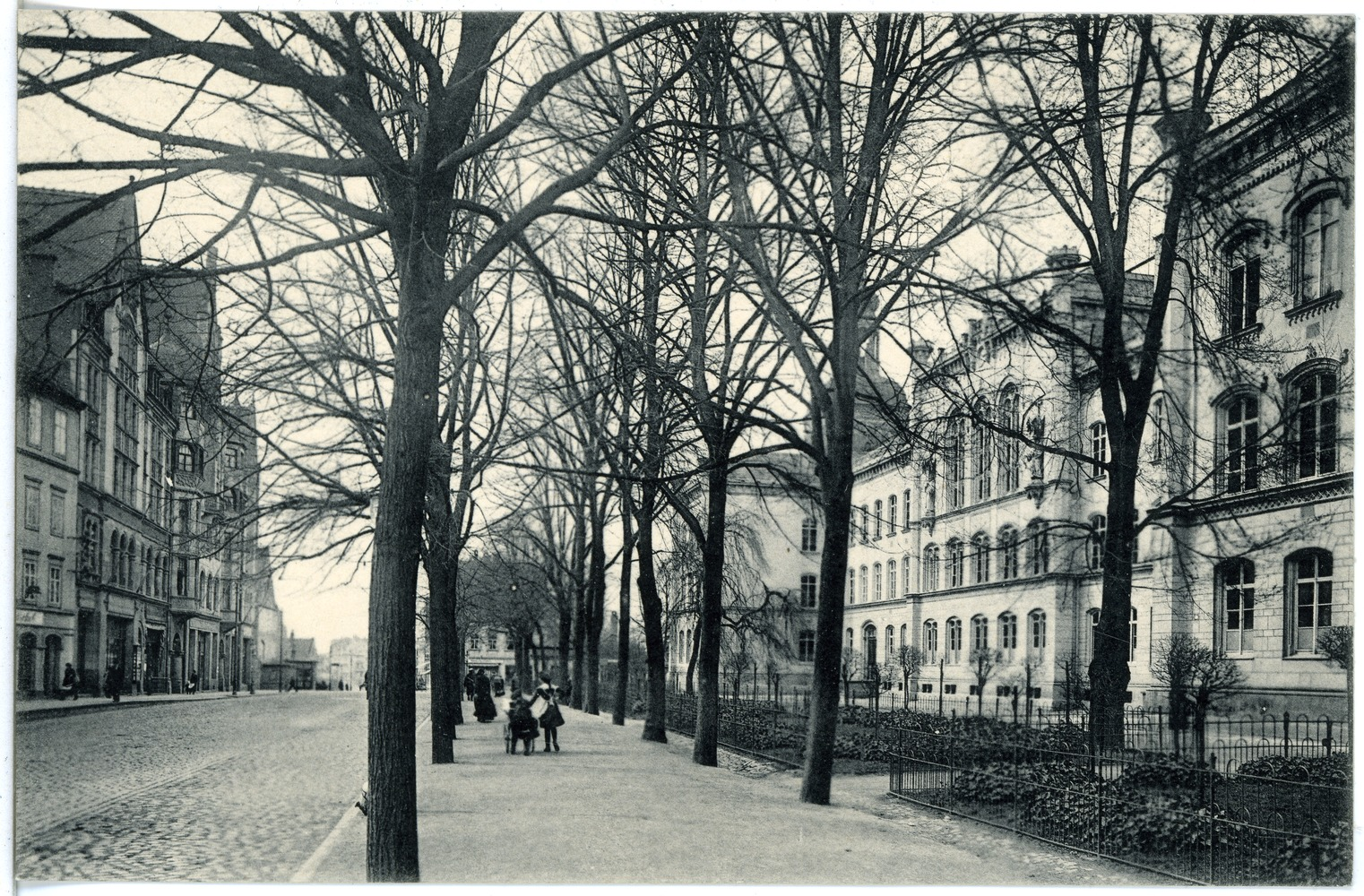 Bautzen; Lauengraben This postcard is from publisher Brück & Sohn in Meißen ( postcard has a unique number 18754 and is available in a higher resolution at the publisher. This images was uploaded in a cooperation project between Wikipedians and the publisher.